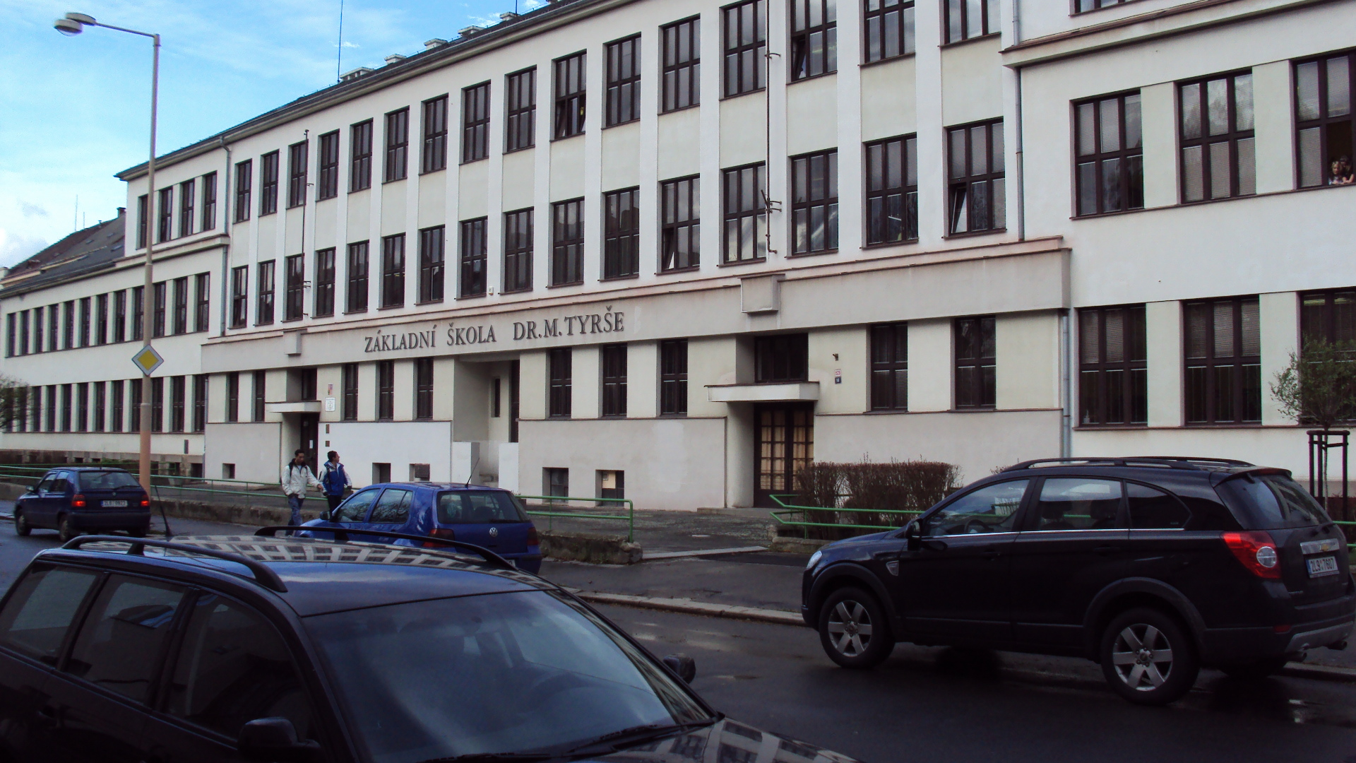 Základní škola Tyršova v České Lípě